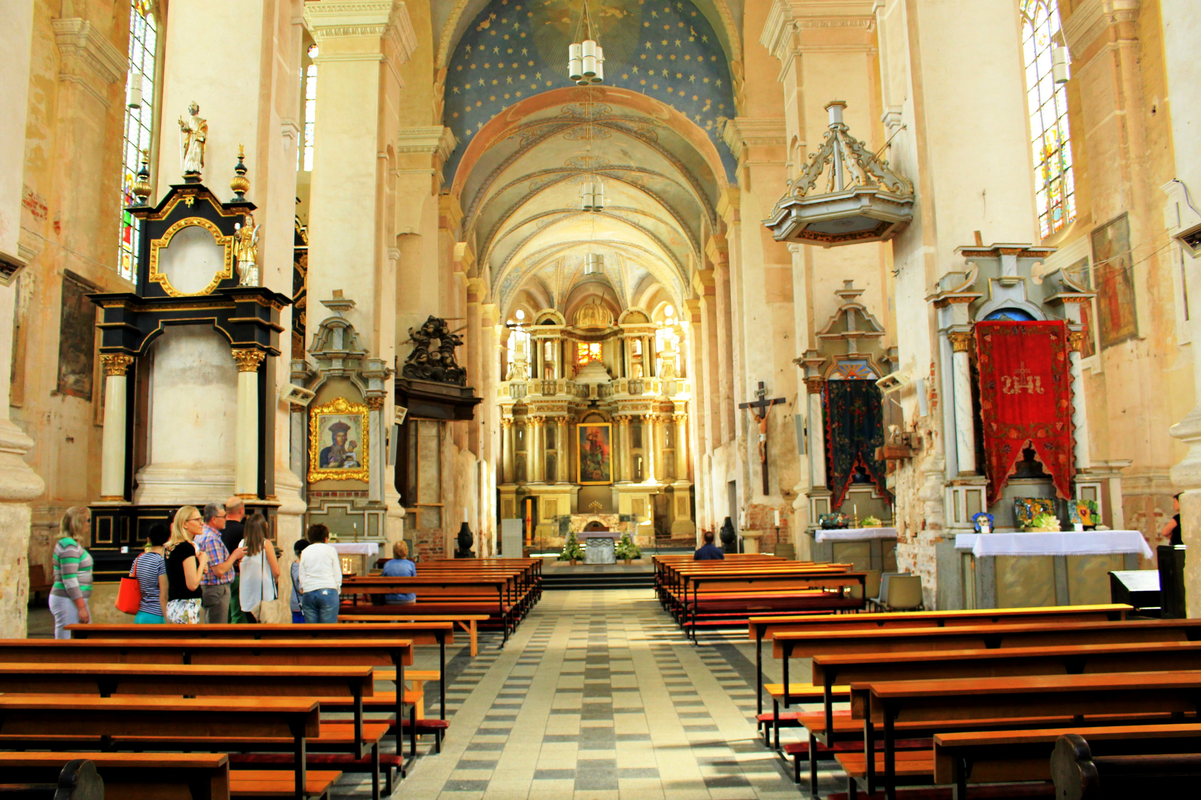 restauruojamas Šv. Jurgio bažnyčios interjeras